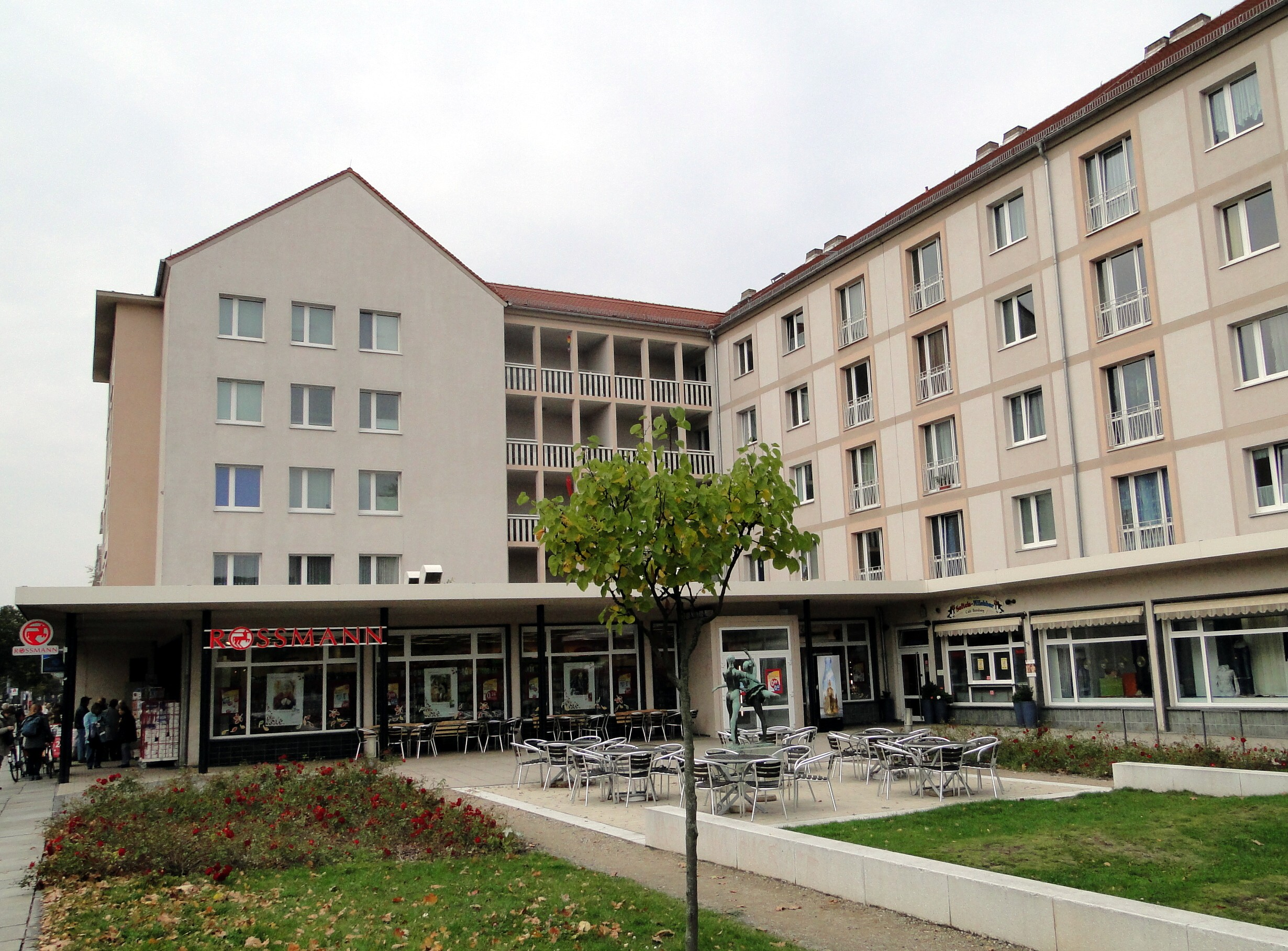 Borsbergstraße in Dresden mit Blick auf das ehemalige Café Borsberg